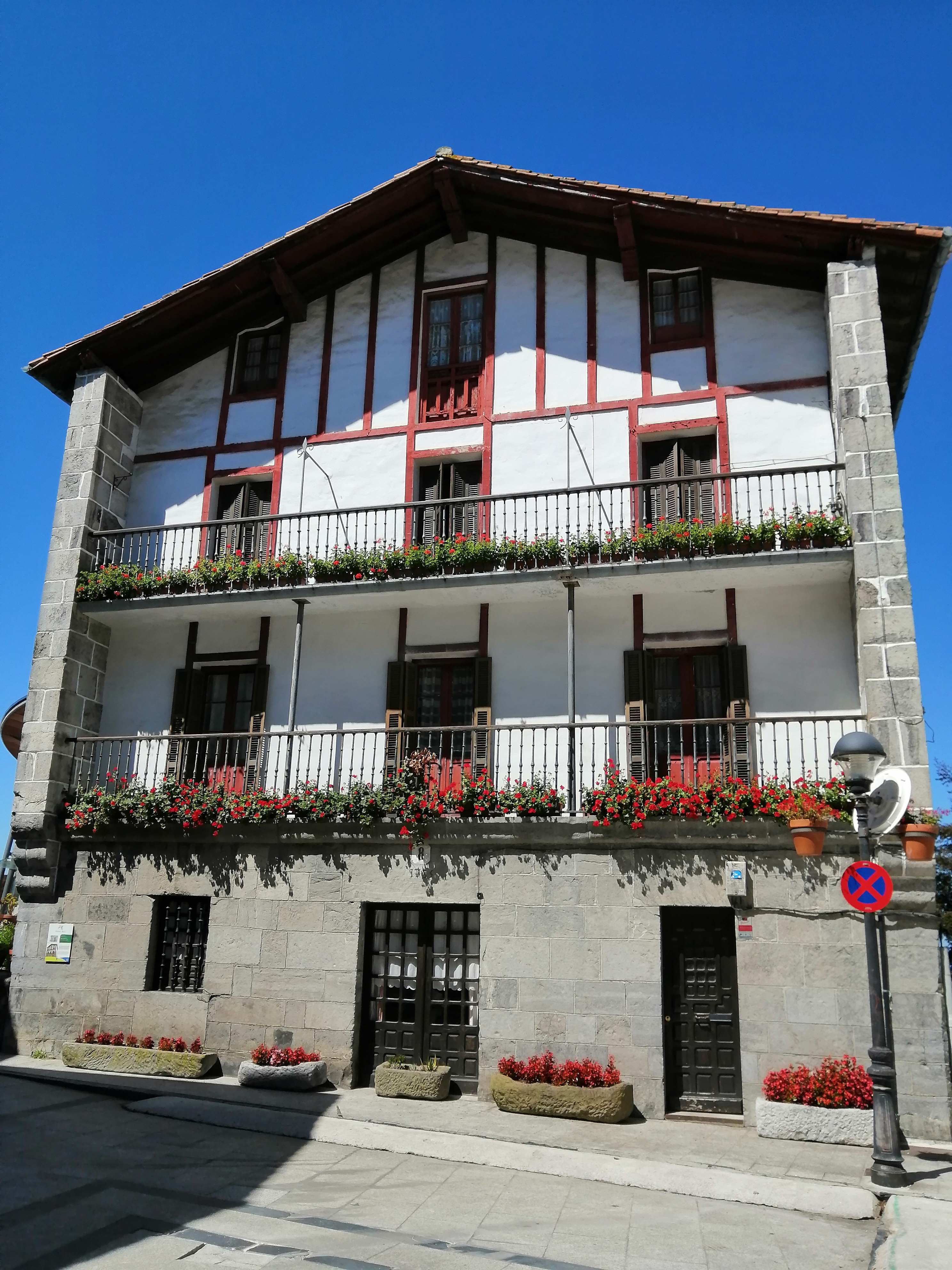 Ostatu berri, Aia